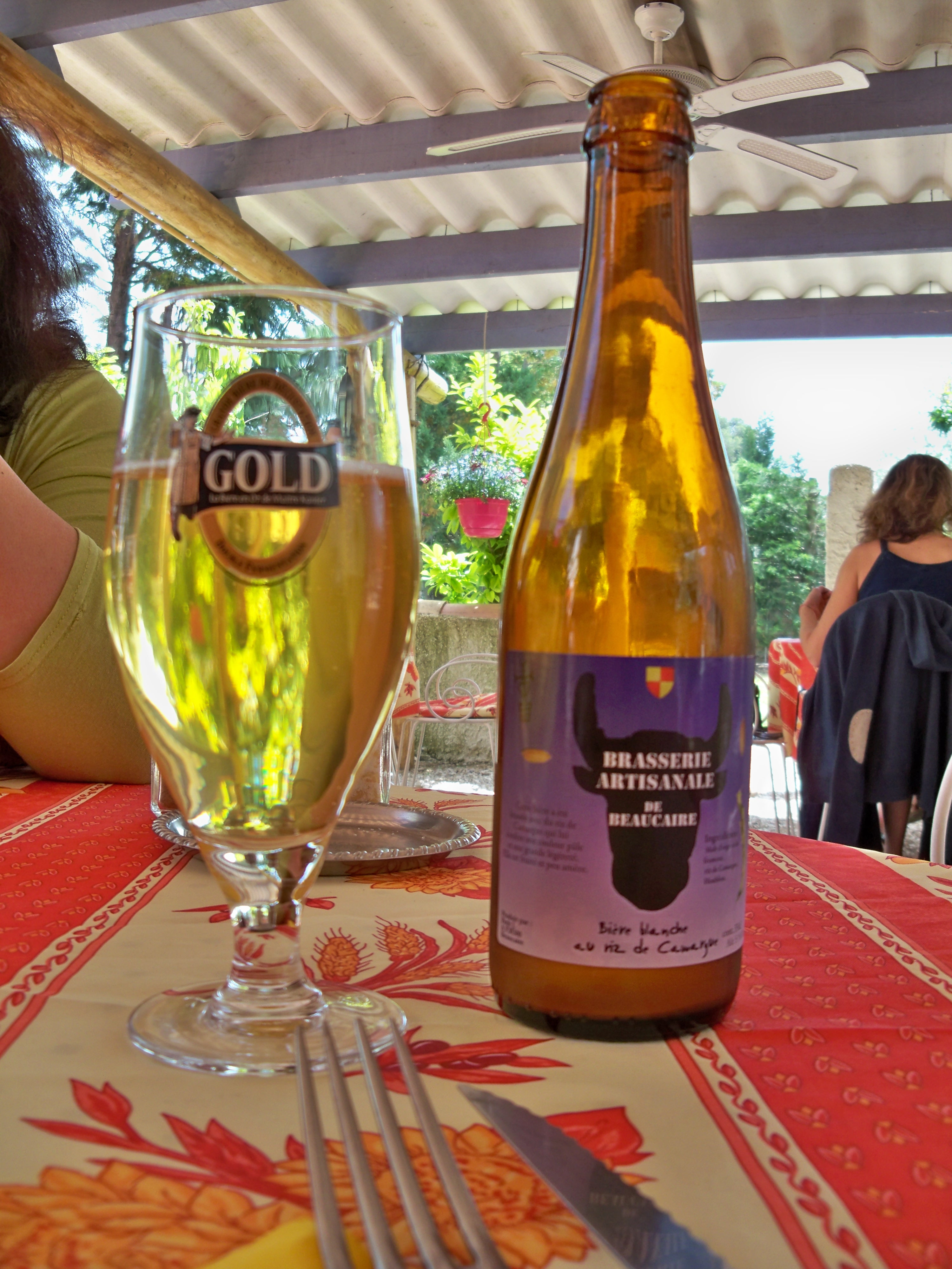 Bière blanche artisanale de Beaucaire (13)